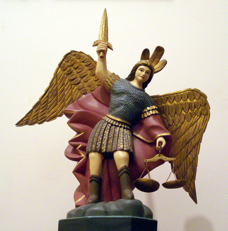 Anônimo: São Miguel. Arte popular de Olinda, Brasil. Coleção privada.